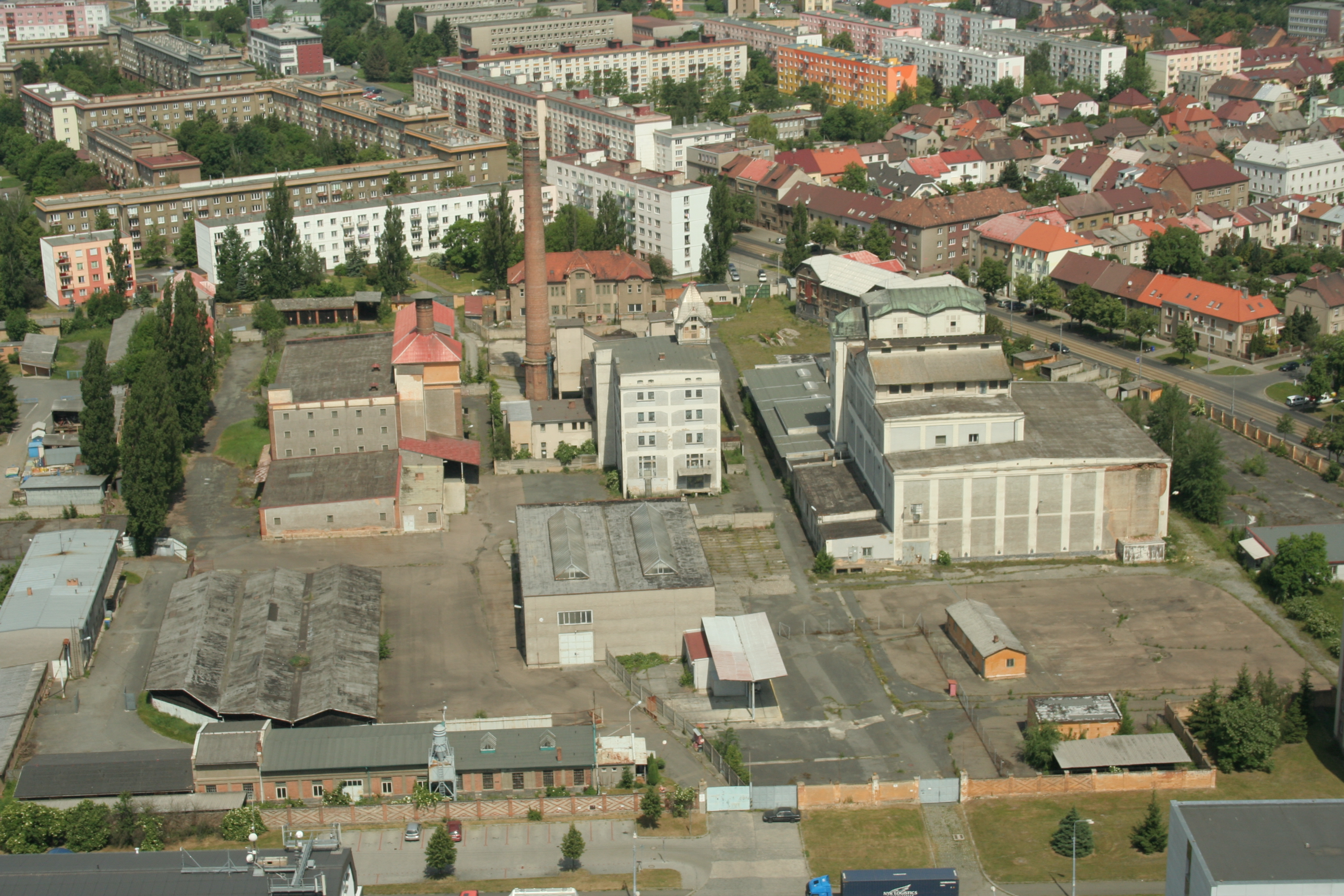 Světovar Slovany